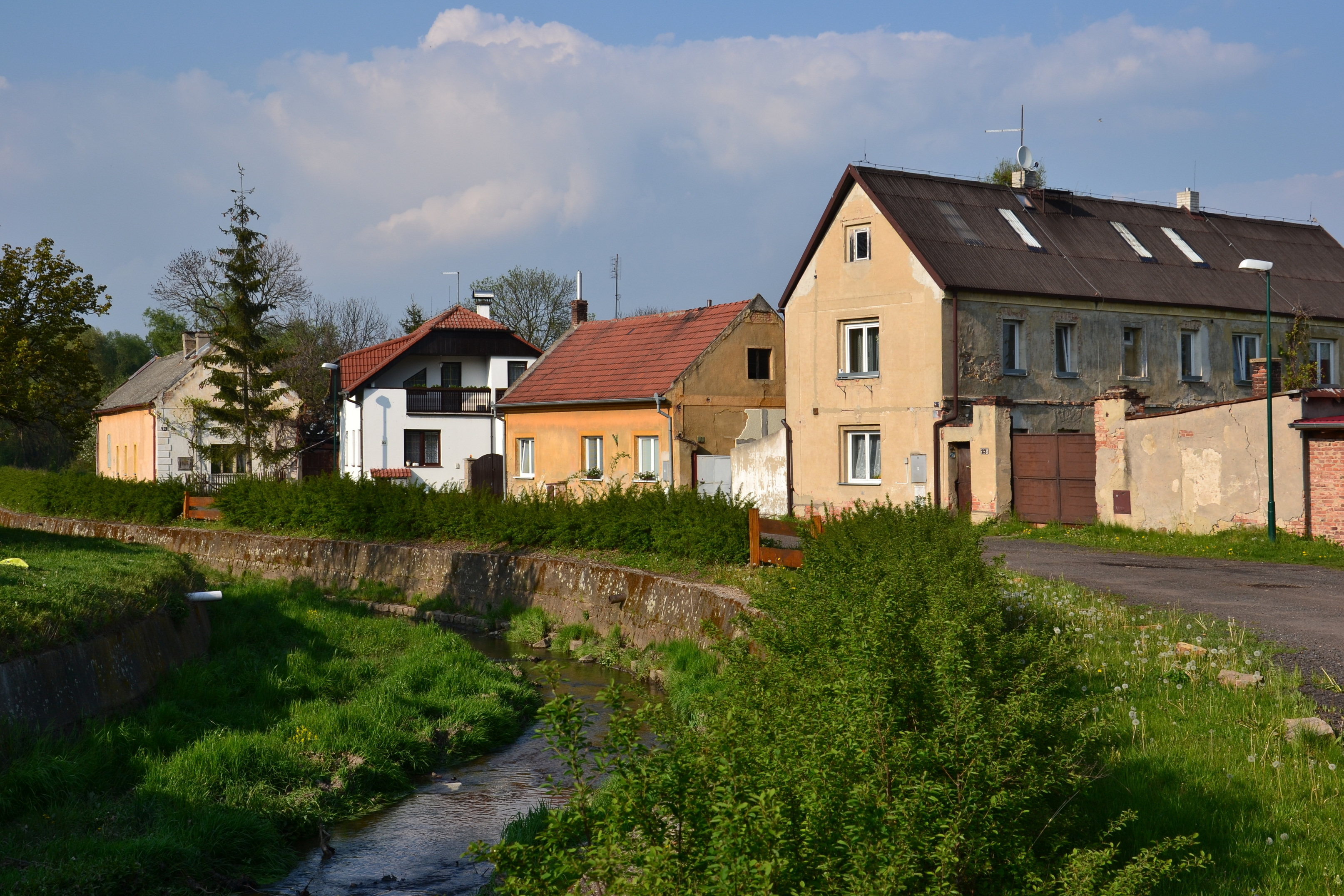 Hořenec - domy podél koryta Hačky